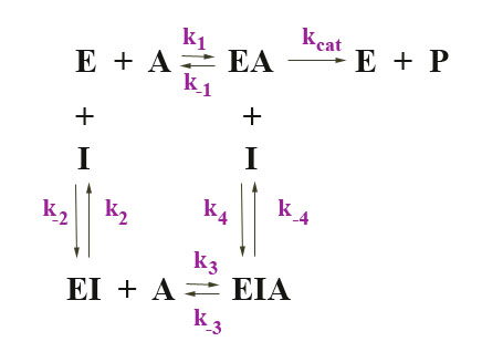 Enzimkinetika-gátlás